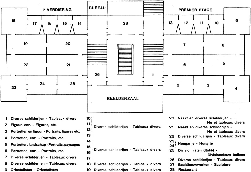 Plattegrond bij de Stedelijke internationale tentoonstelling van kunstwerken van levende meesters